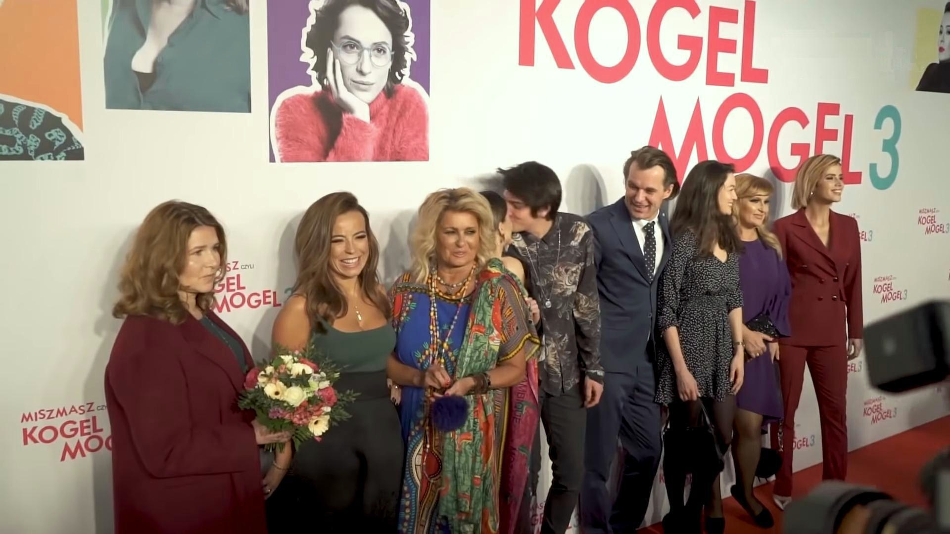 Aktorzy filmu „Miszmasz, czyli kogel-mogel 3” podczas premiery.